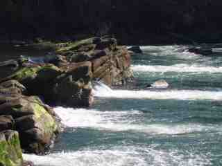 La Tallapoosa près de Tallasee